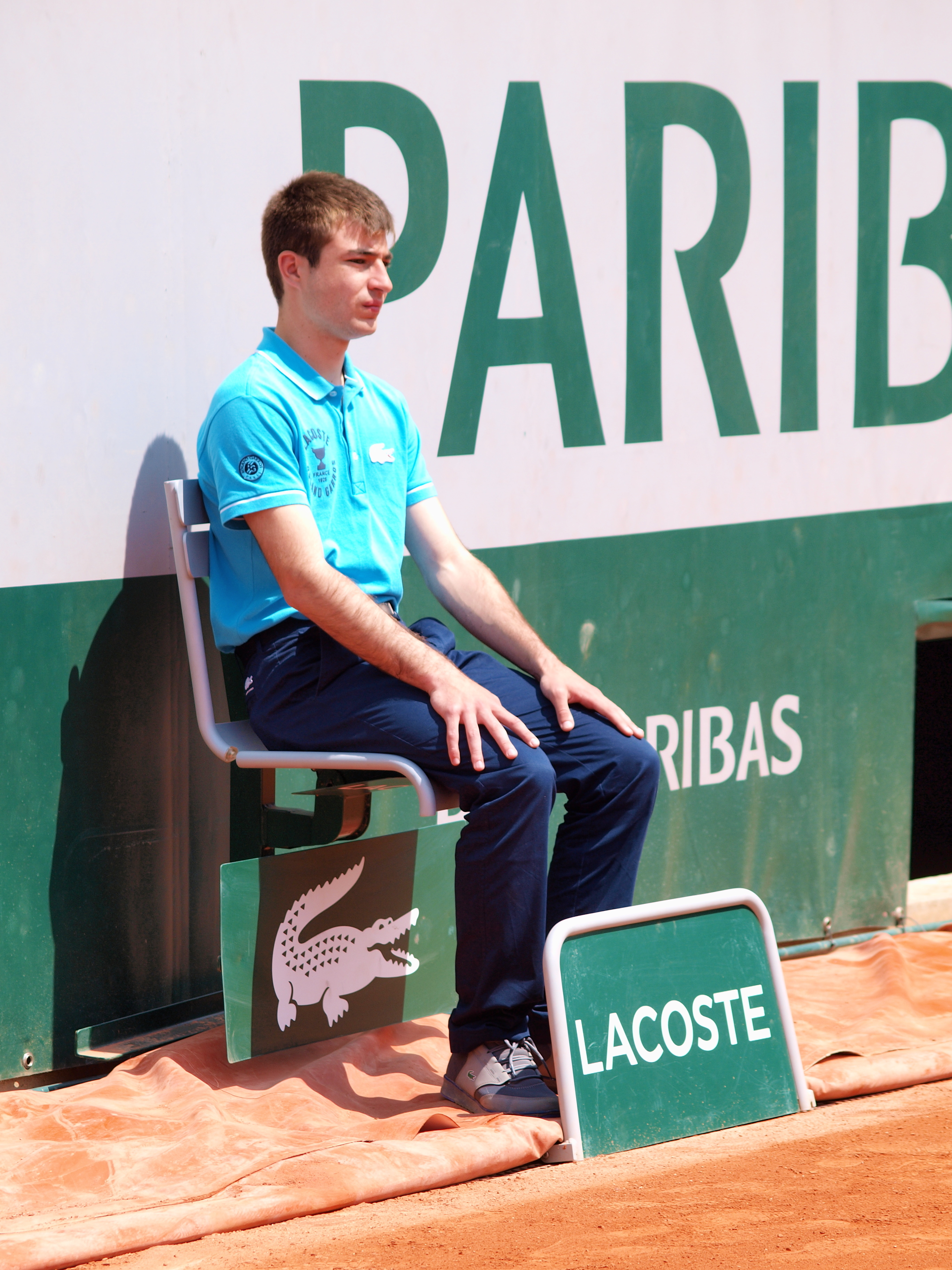 Personnel de logistique, lors des internationaux de France de tennis, sur le court Lenglen du stade Roland Garros, à Paris, le 25 mai 2016.